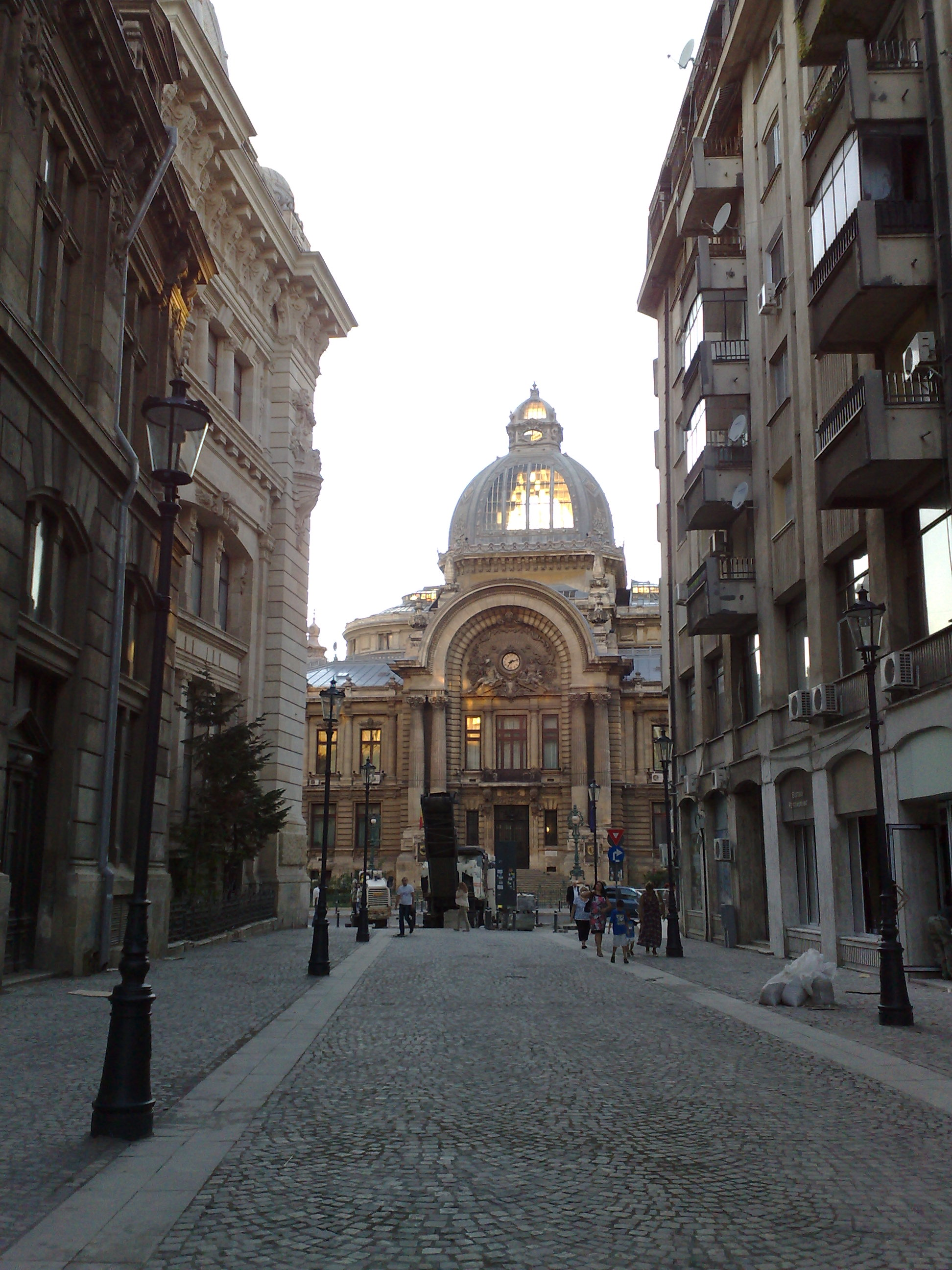 Ansamblul de arhitectură "Str. Stavropoleos"